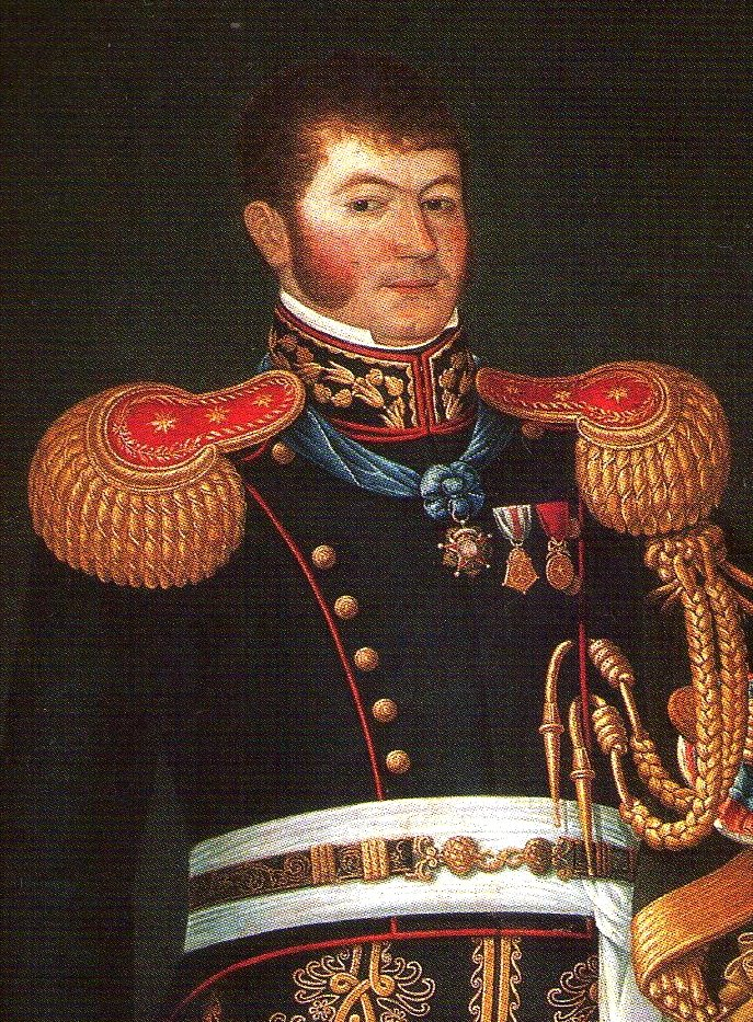 Retrato del General Coronel Don Ramón Freire